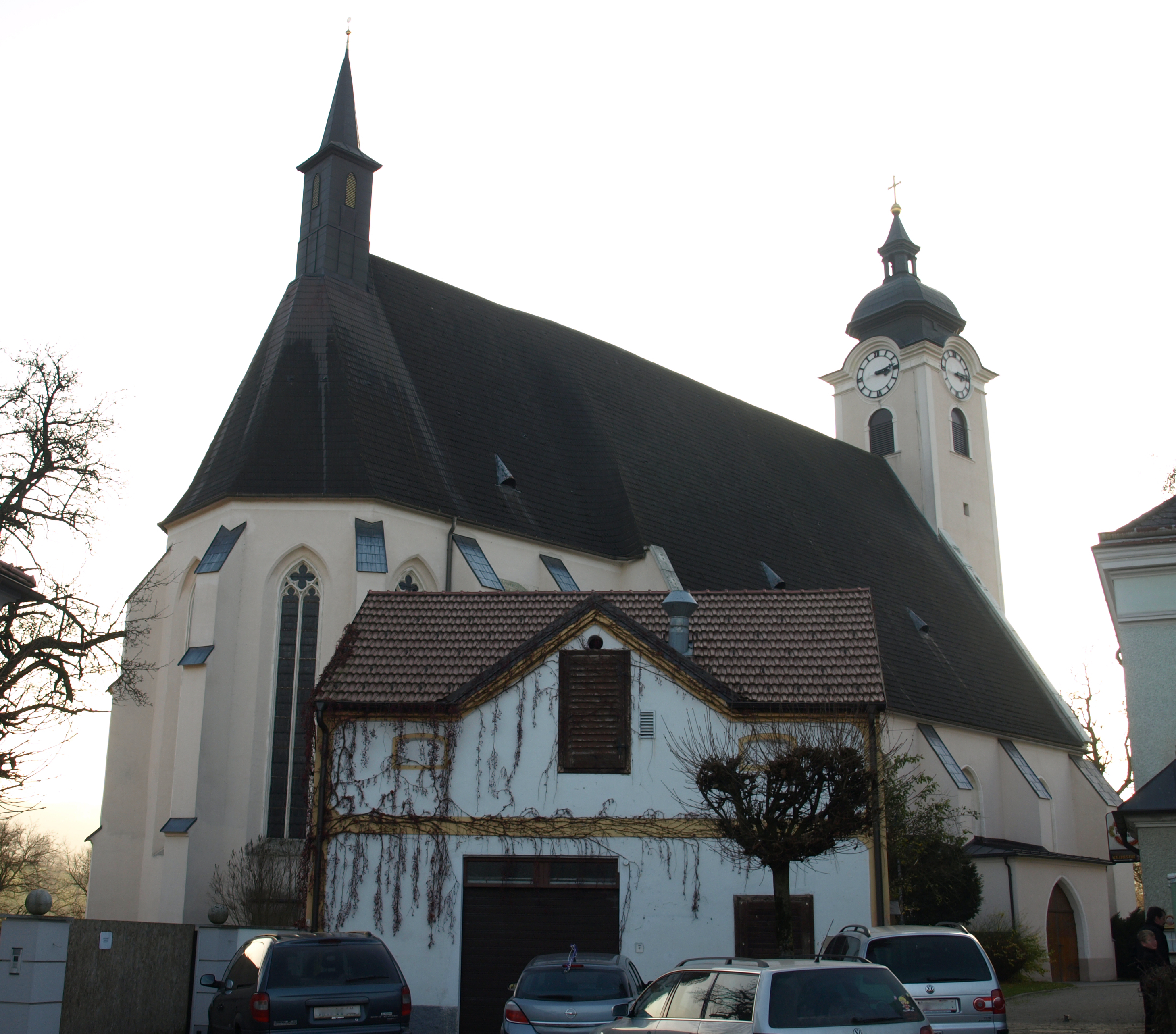 Kath. Pfarrkirche Mariae Himmelfahrt